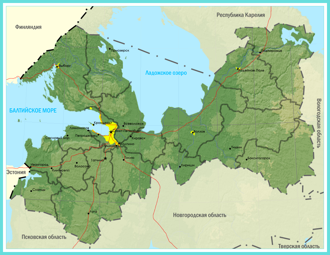 Description = Carte de la région de Leningrad Auteur = Ivan S. Aiglon (Орлёнок Иван Сергеевич)